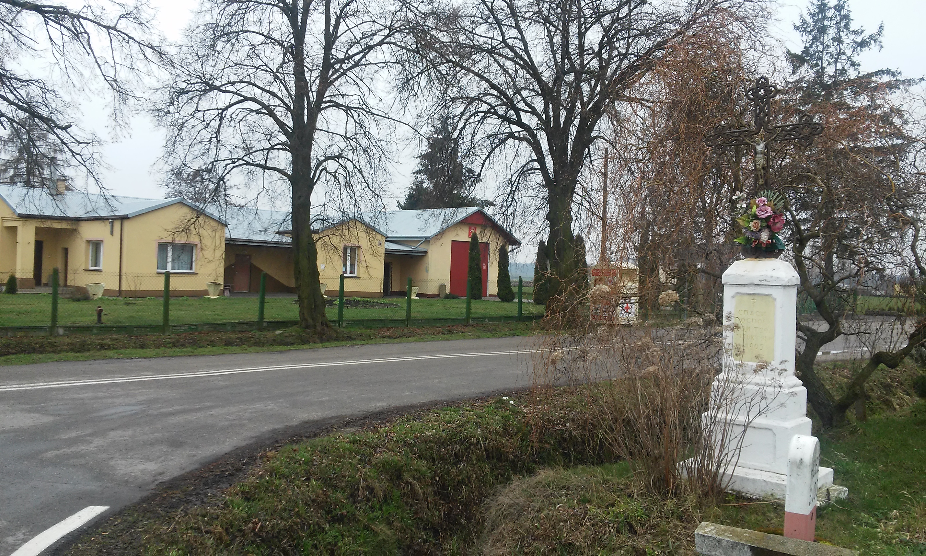 Centrum Czerniczyna. Prawosławny krzyż wotywy i budynek ochotniczej straży pożarnej